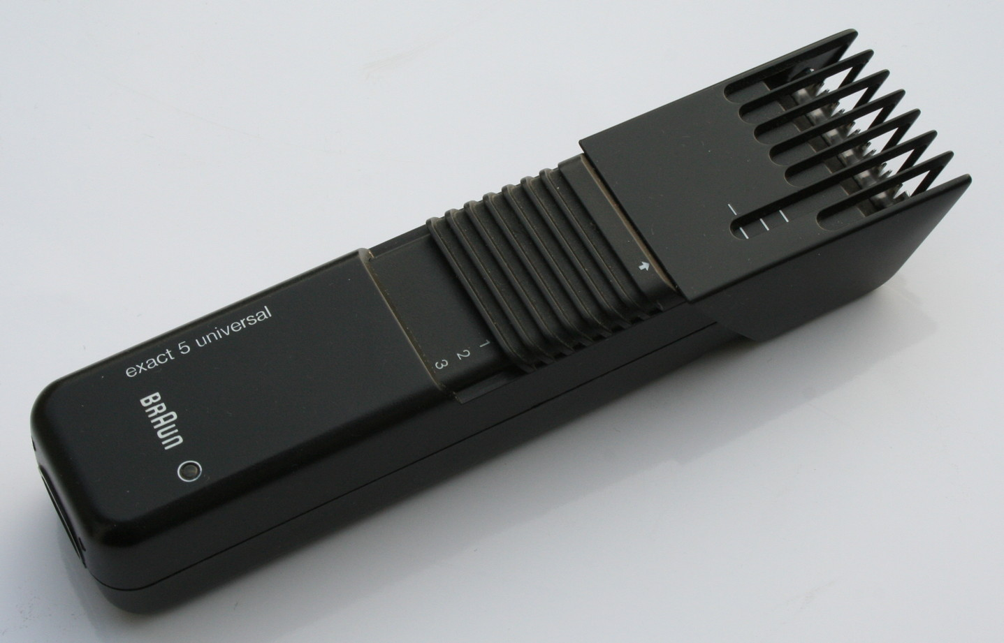 Bartschneider